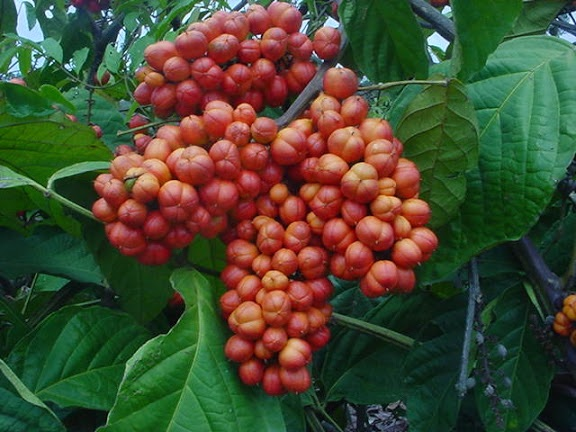 A fruta que envolve a semente do guaraná. Fotografado na Zona Rural de Ariquemes-RO